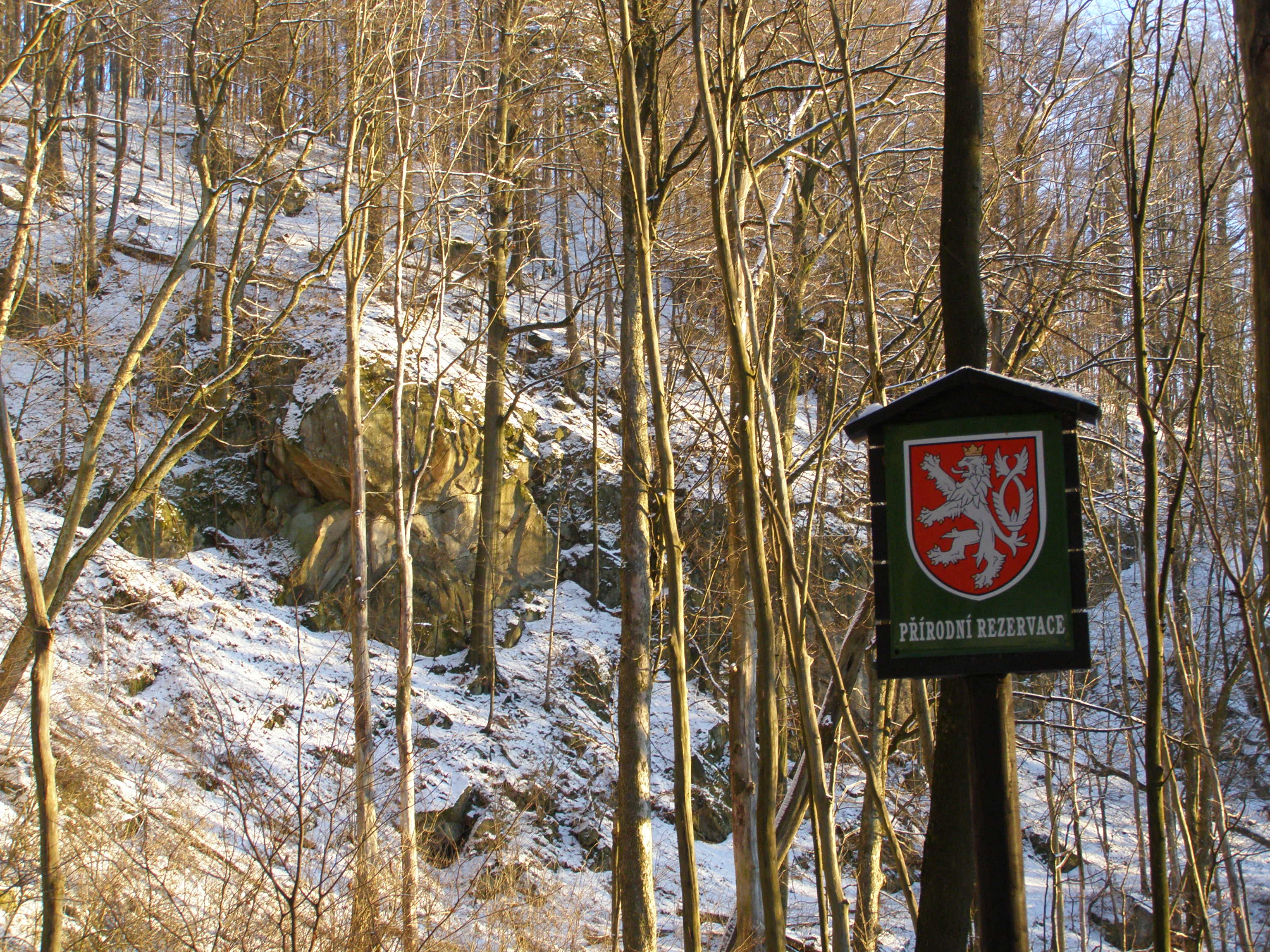 Hostýnské vrchy, PR Smrdutá